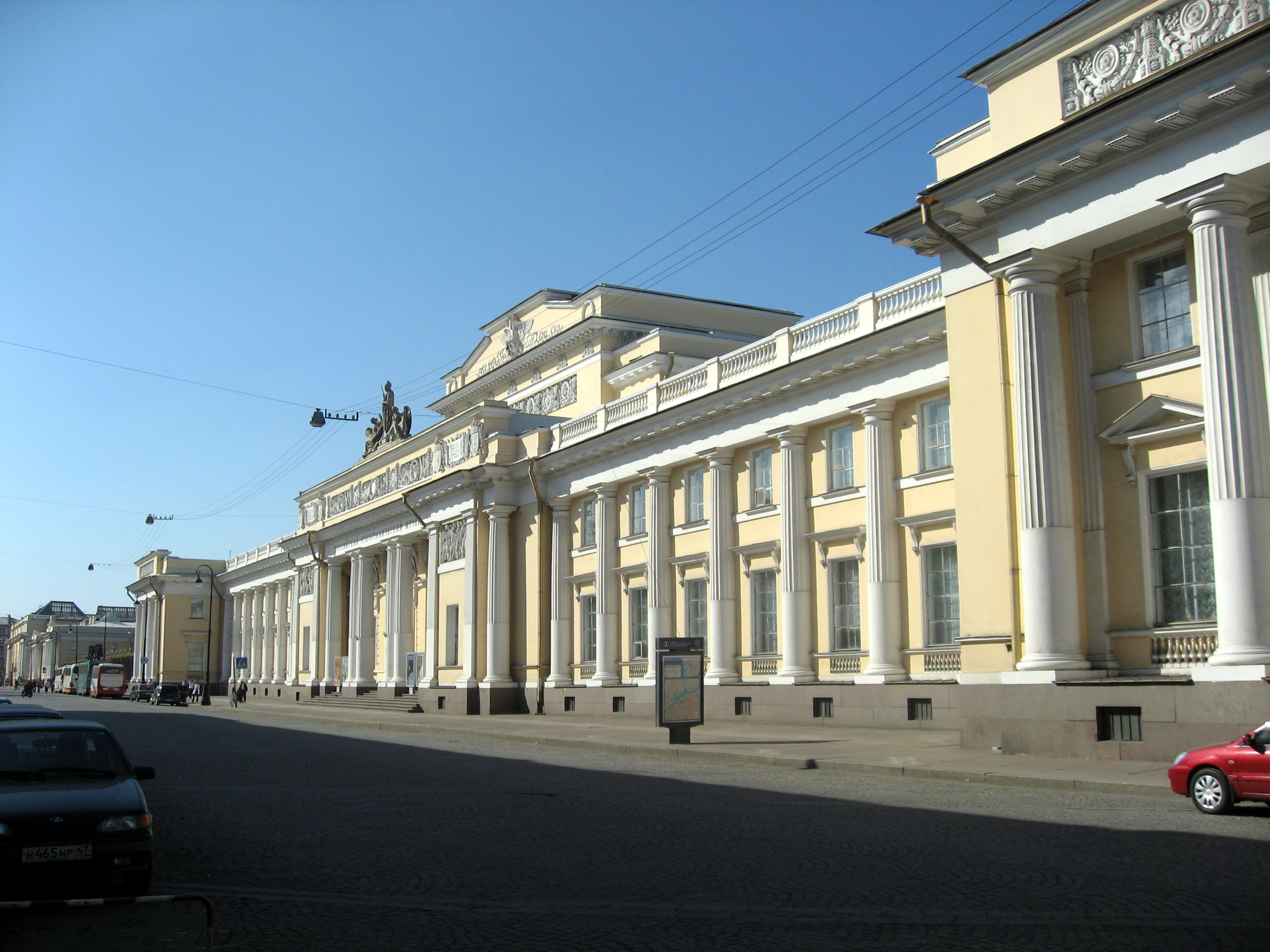 Sankt-Petěrburg